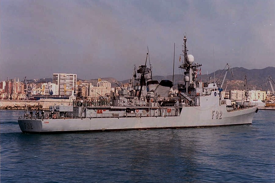 La corbeta Diana (F-32), fue convertida en Buque de Apoyo, ahora con el numero (M-11). Puerto de Málaga, Spain.